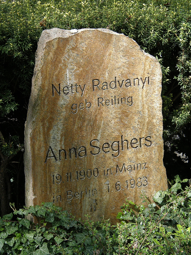 Anna Seghers, Bilder vom Dorotheenstädtischer Friedhof